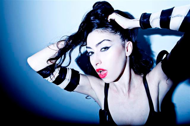 הילה סעדה ברומאו ויוליה האנגר גשר